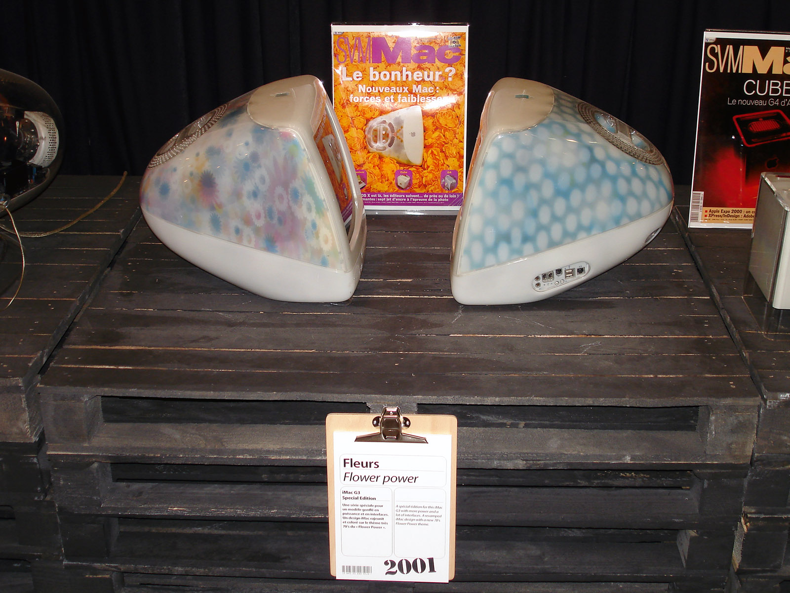 Exposition des 25 ans du Mac au musée de l'Informatique à La Défense, Hauts-de-Seine, France. Apple iMac G3, Special Edition, année 2001.